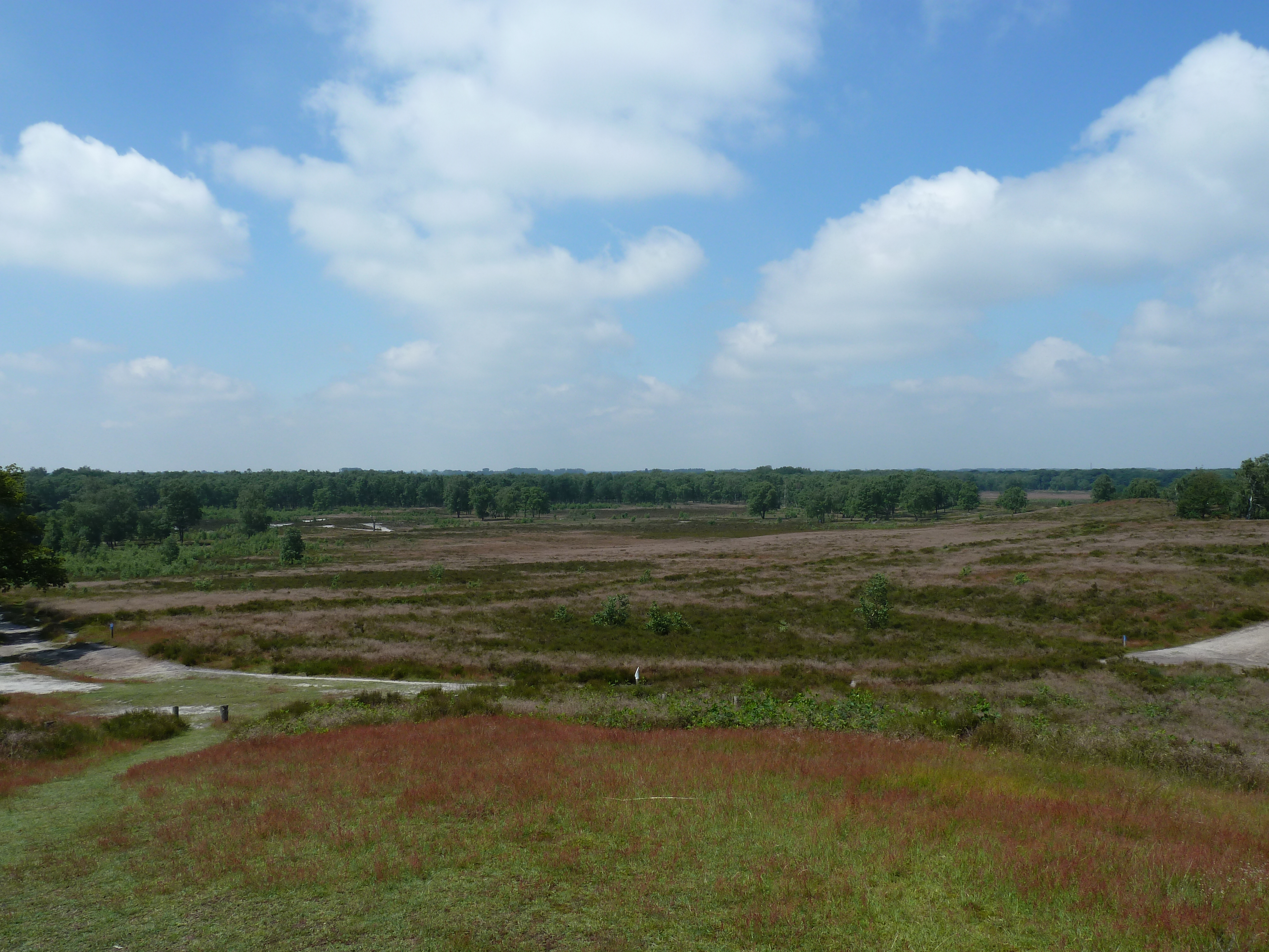 Zicht vanaf het Vorstengraf op De Hamert, Bergen, Limburg, Nederland